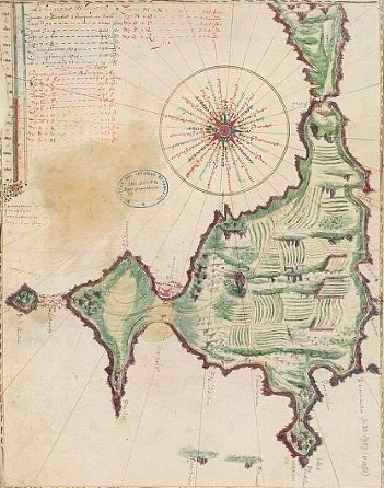 Carte de l'Isle du Conquet (en fait la presqu'île de Kermorvan) en 1628 par Jean Béchec (attention le nord est à gauche sur cette carte).